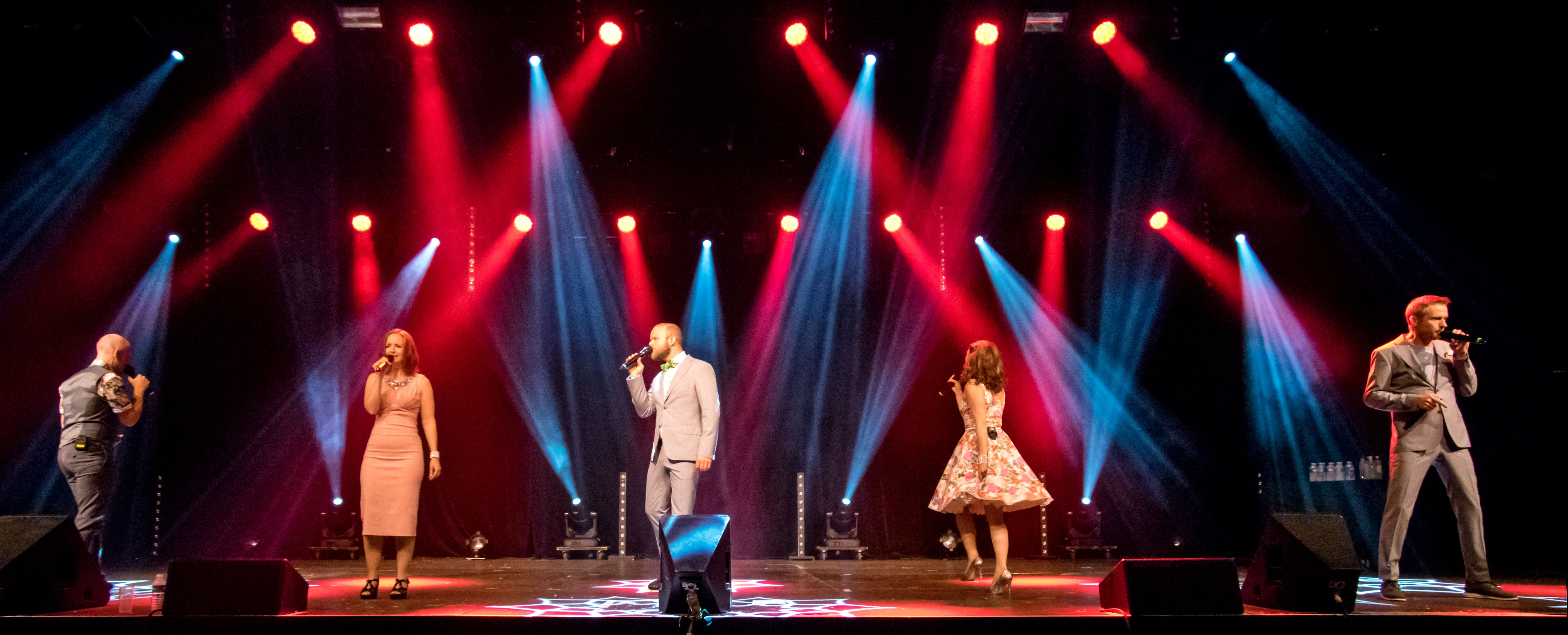 Bilder vom Zelt Musik Festival 2016 in Freiburg im Breisgau Die A capella Band "The real Group"